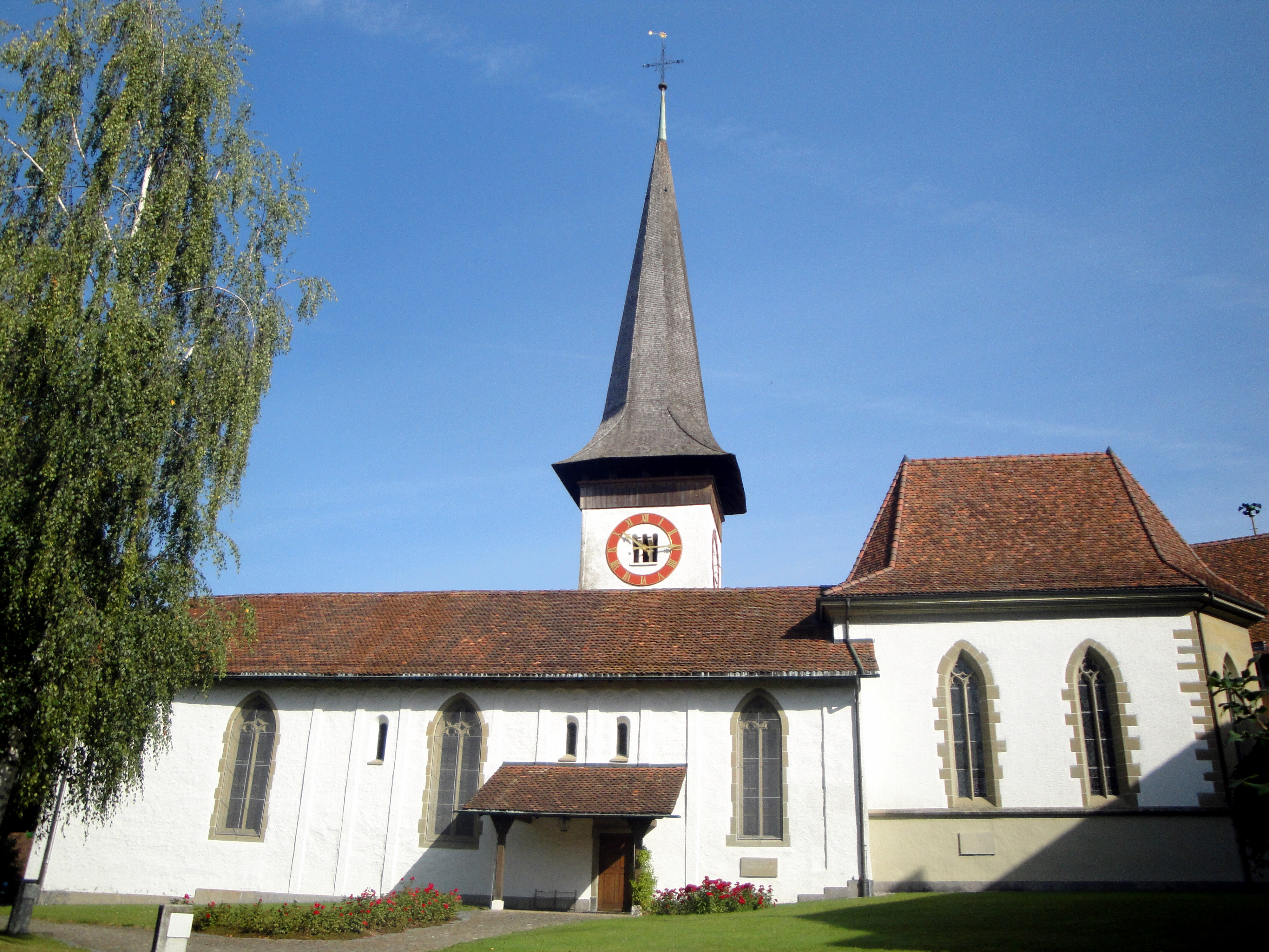 Köniz, Kirche der ehemaligen Komturei